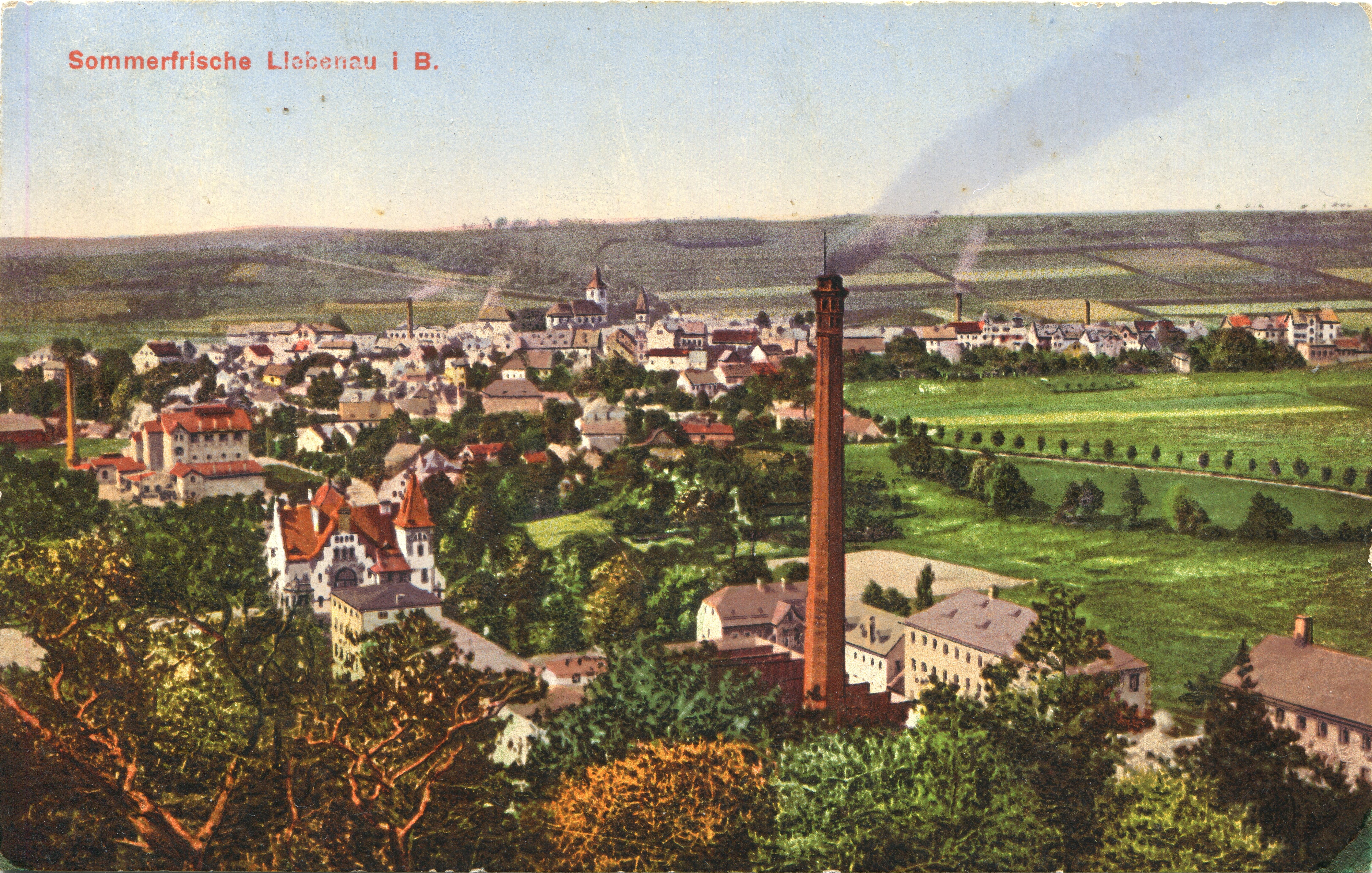 Hodkovice nad Mohelkou - Sommerfrische Liebenau i. B., Franz Dlouhy. Posláno 1915 (vydáno 1912).